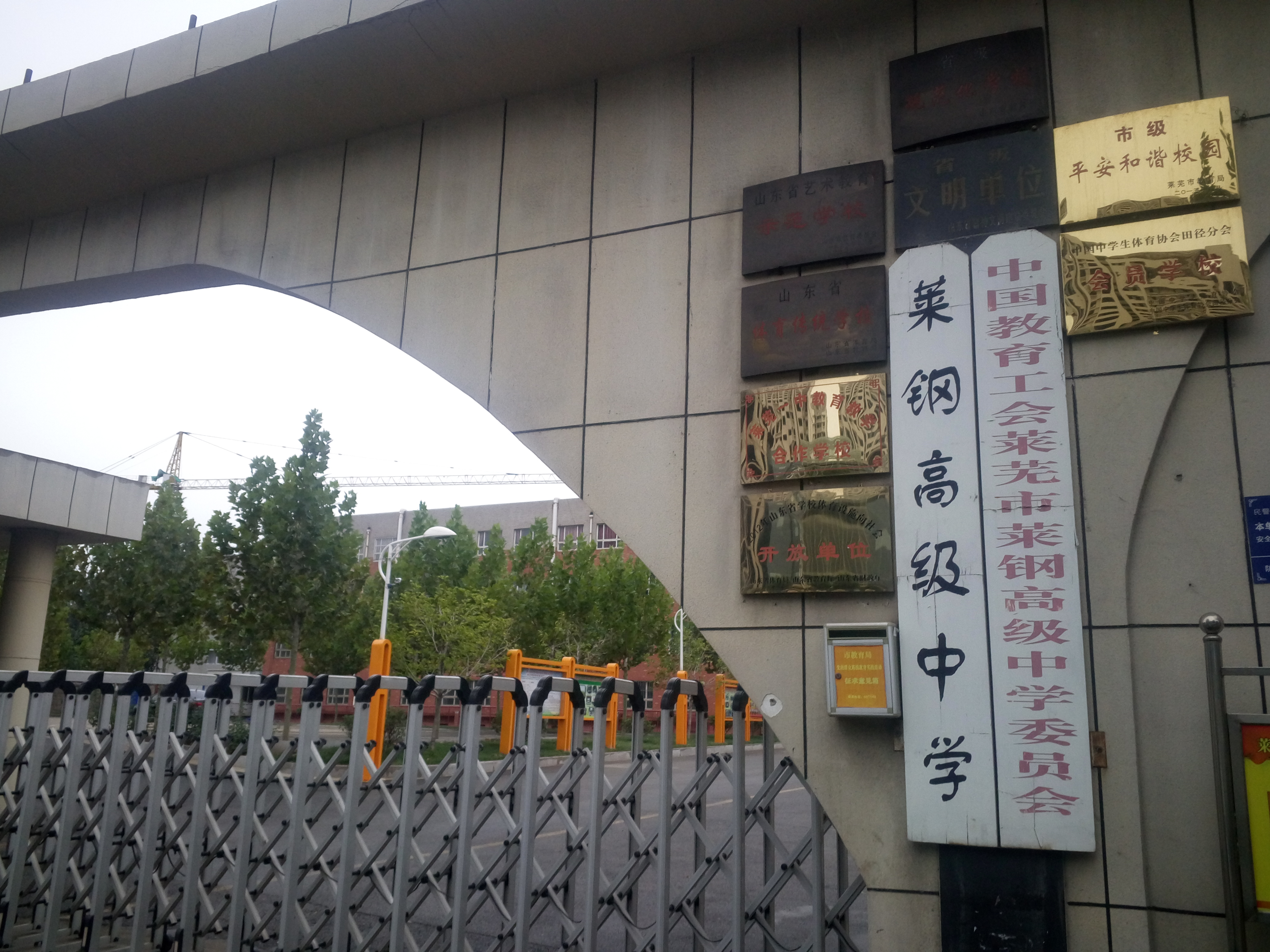 山东莱芜钢城莱钢高中